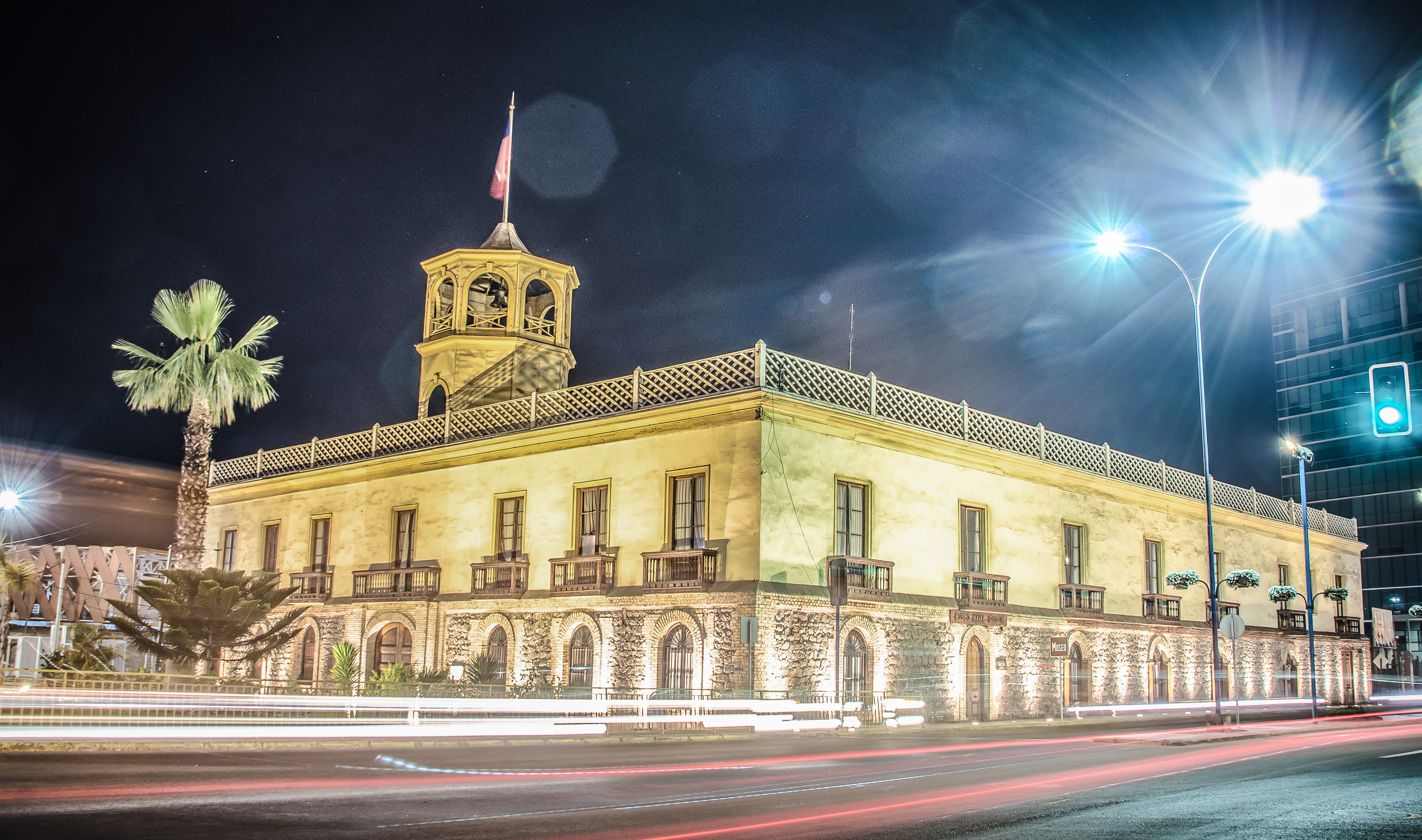 Aduana de Iquique This is a photo of a national monument in Chile: 520